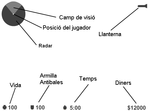 Interfície del joc Counter-Strike, en català.